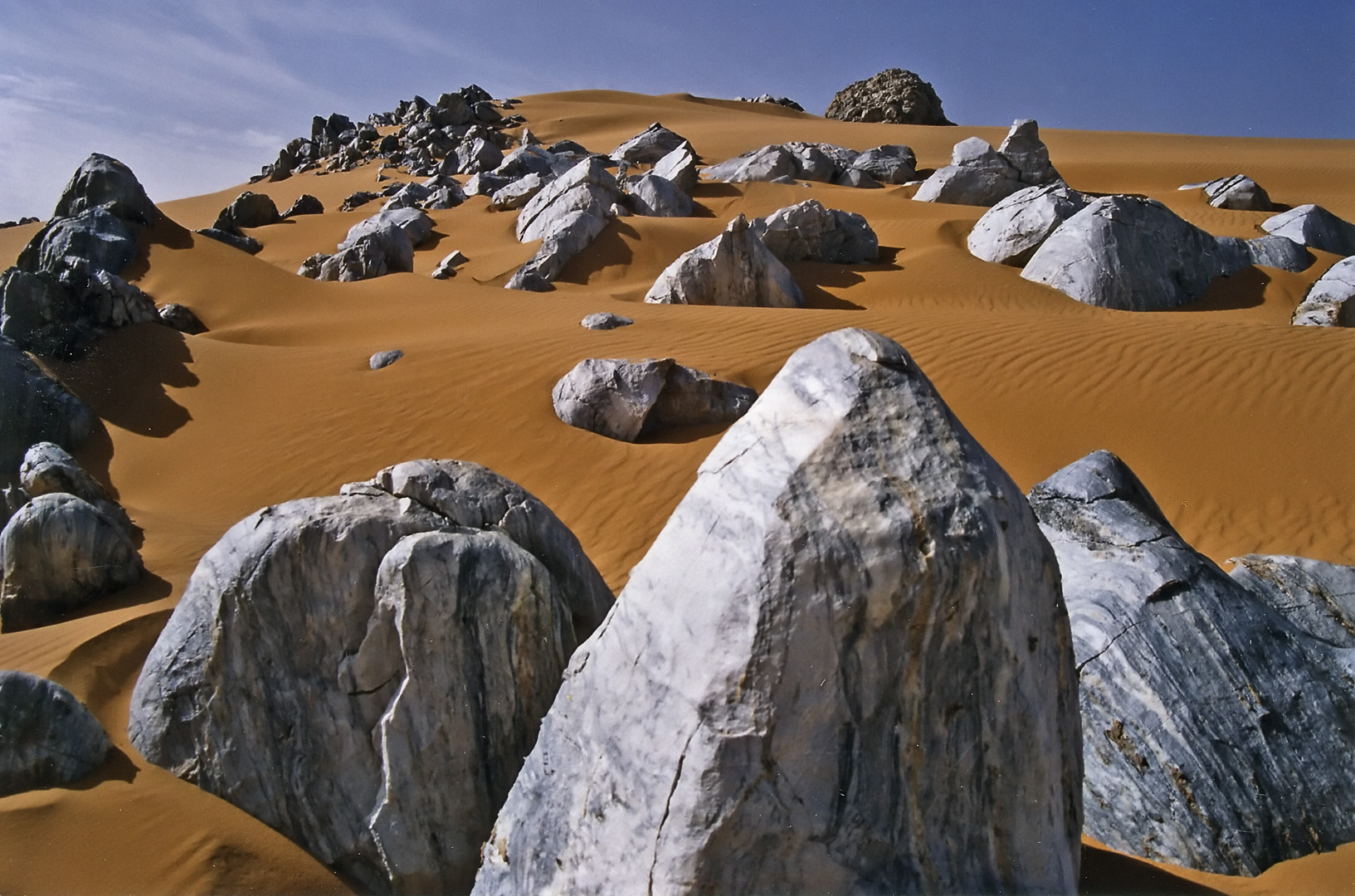 Montagnes Bleues, dans le Massif de l'Aïr